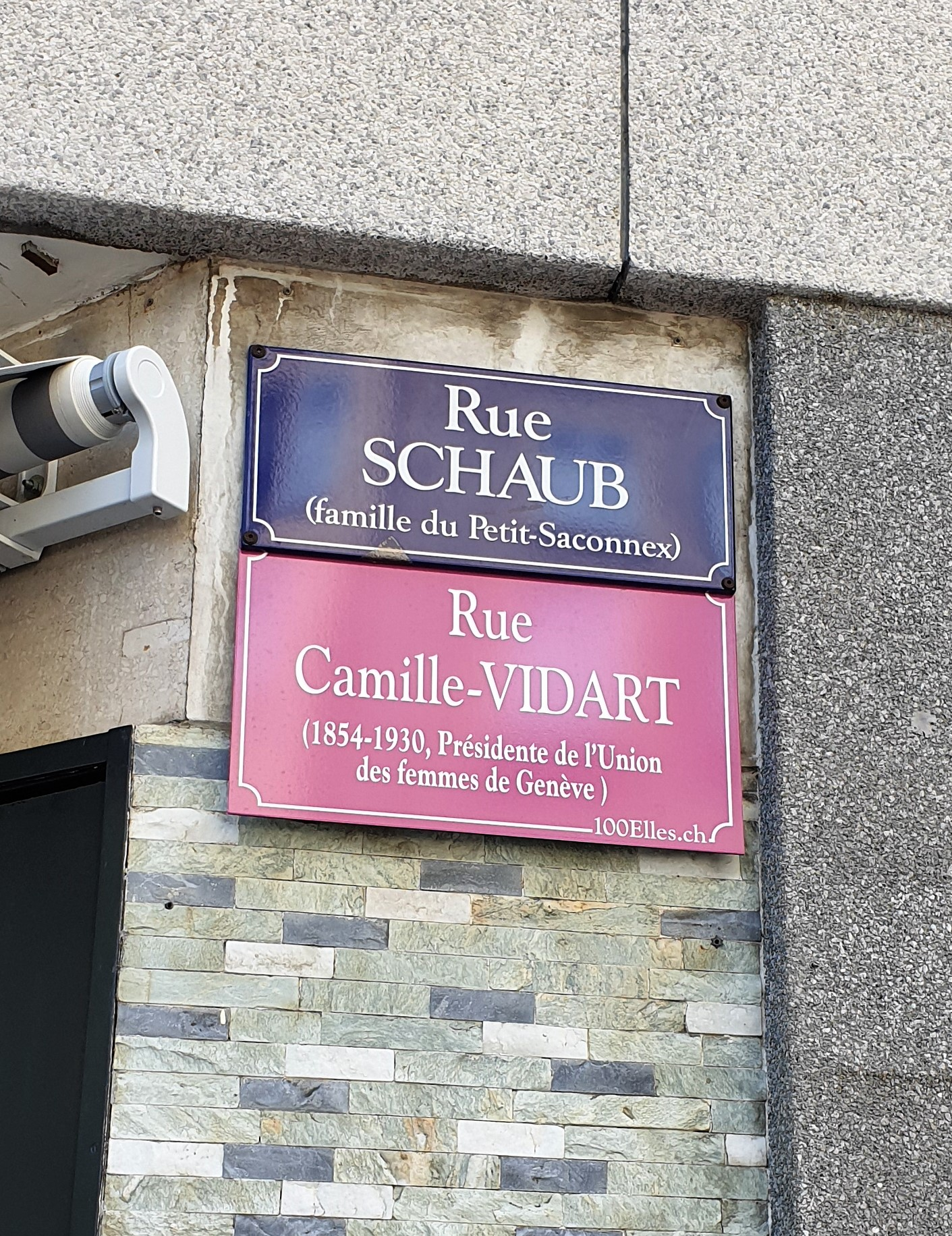 Plaque temporaire de rue apposée dans le cadre du projet 100elles à Genève en 2019